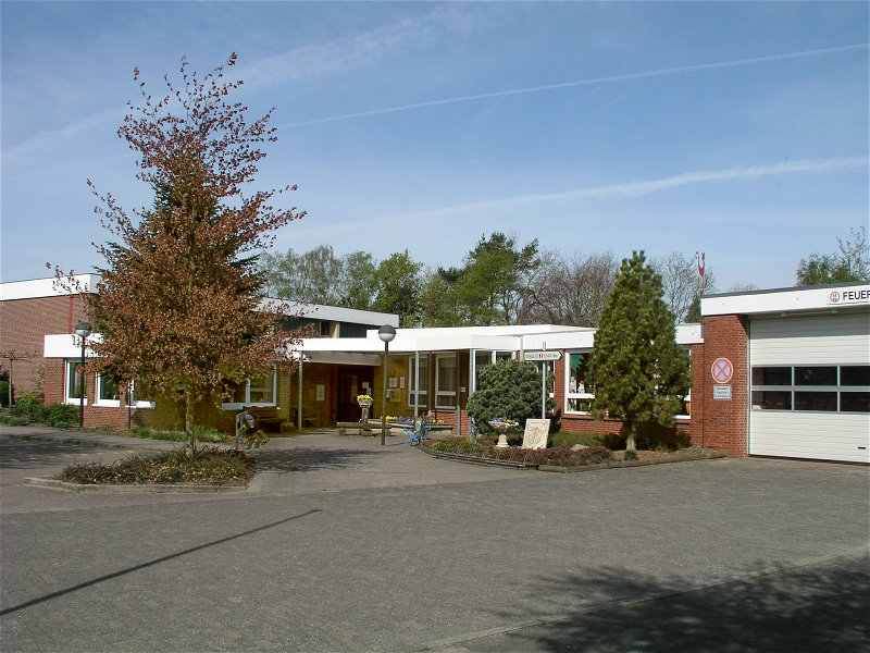 Gemeindezentrum Heidgraben 2007